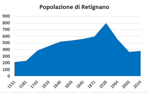 Un grafico che mostra la popolazione di Retignano, Toscana, Italia nei secoli